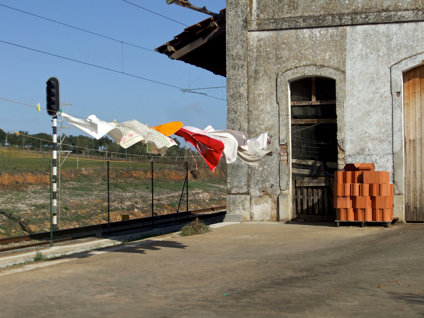 Tipo: A [Apeadeiro] Local: Garvão [Linha do Sul, PK 219] Data e hora: 7 de Novembro de 2009 [12h19]